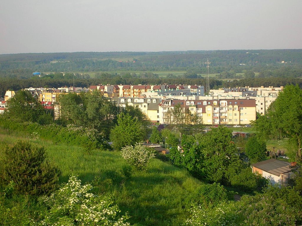 Osiedle Tatrzańskie w Bydgoszczy-Fordonie, na tle zboczy fordońskiego przełomu Wisły